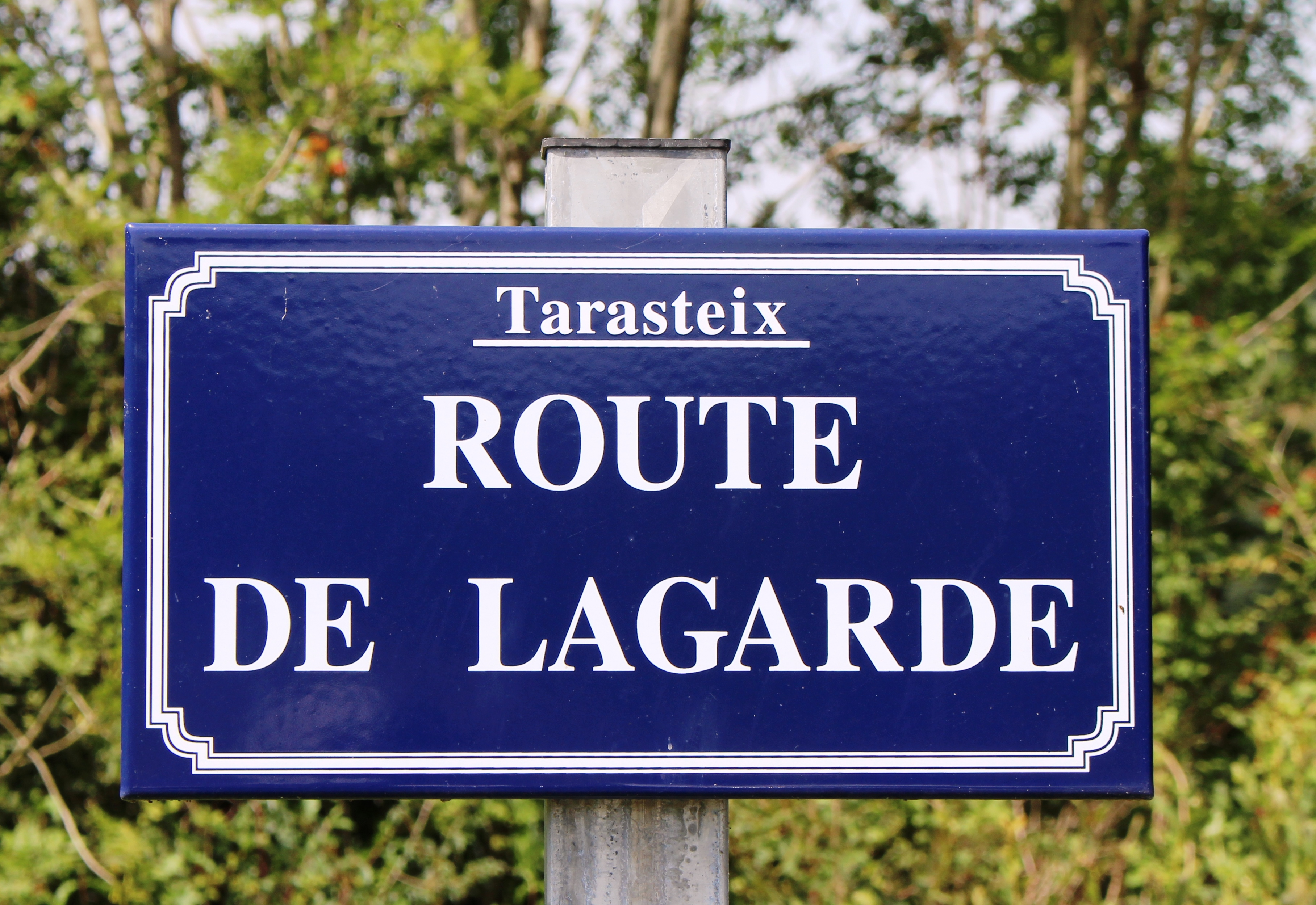 Rue du village de Tarasteix (Hautes-Pyrénées)